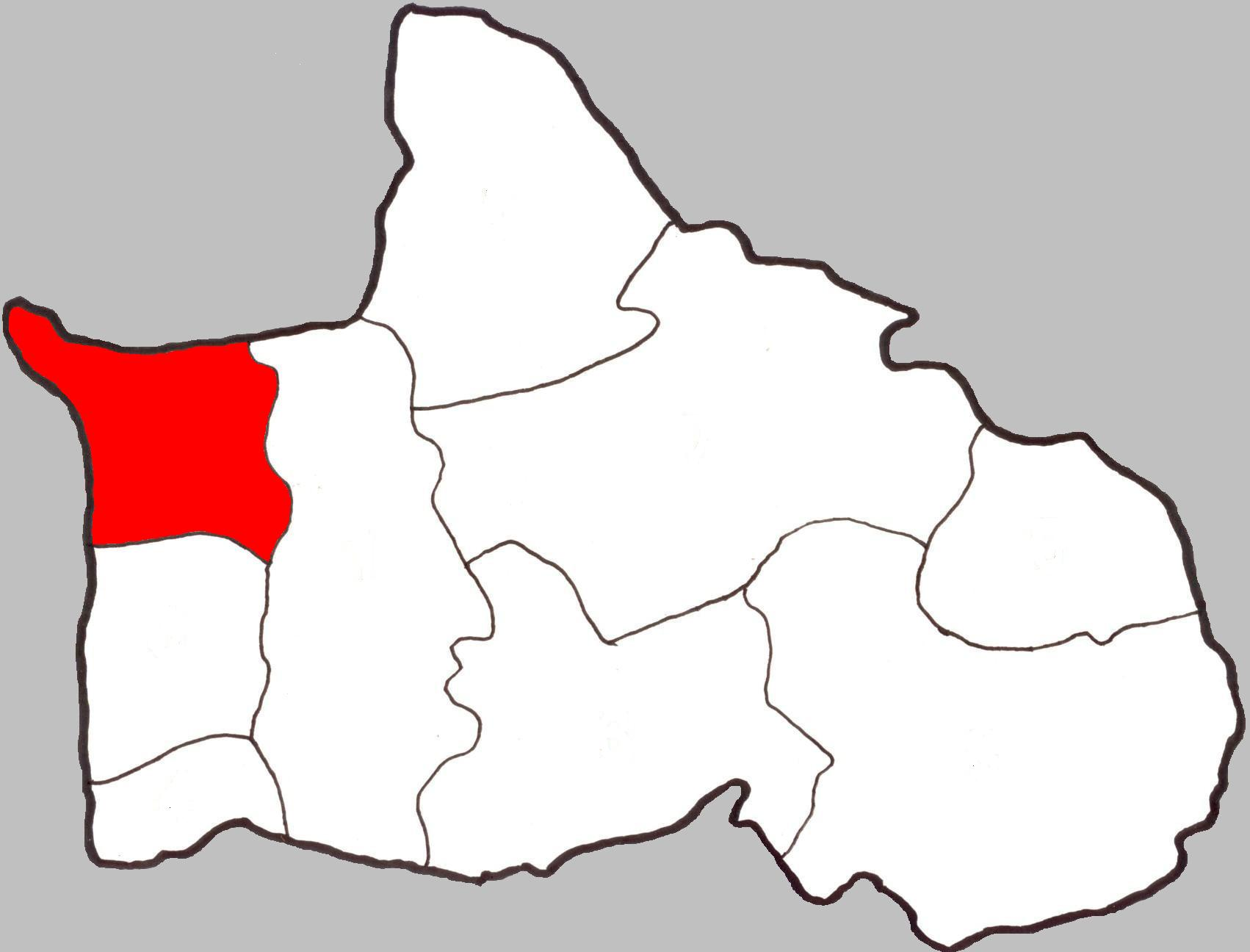 Map of Tambon Ban Rai